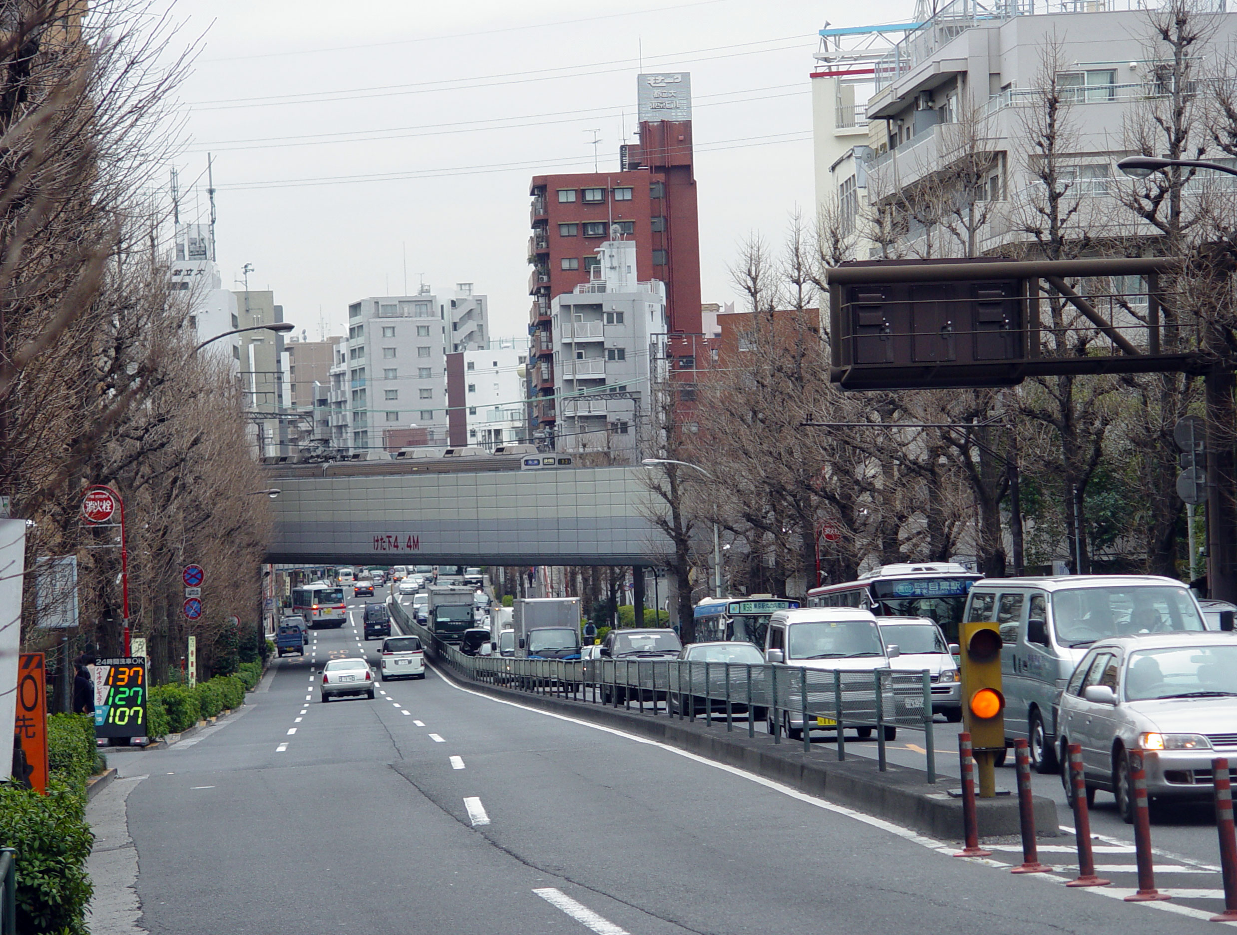 Kakinokizaka slope, Meguro, Tokyo, Japan柿の木坂